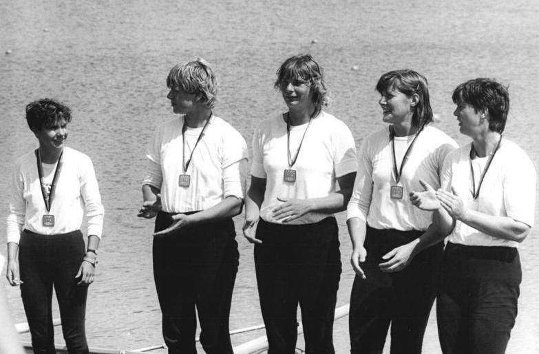 Ruderinnen, DDR ADN-ZB Kluge 21.7.85 Brandenburg: DDR-Meisterschaften im Rudern- Die Renngemeinschaft SG Dynamo Potsdam-SC Berlin-Grünau-SC Einheit Dresden mit Carola Lichey, Steffi Götzelt, Jutta Ambromeit, Kerstin Spittler und Steuerfrau Daniela Neunast (v.r.n.l.) holte sich im Vierer mit Steuermann die Goldmedaille.